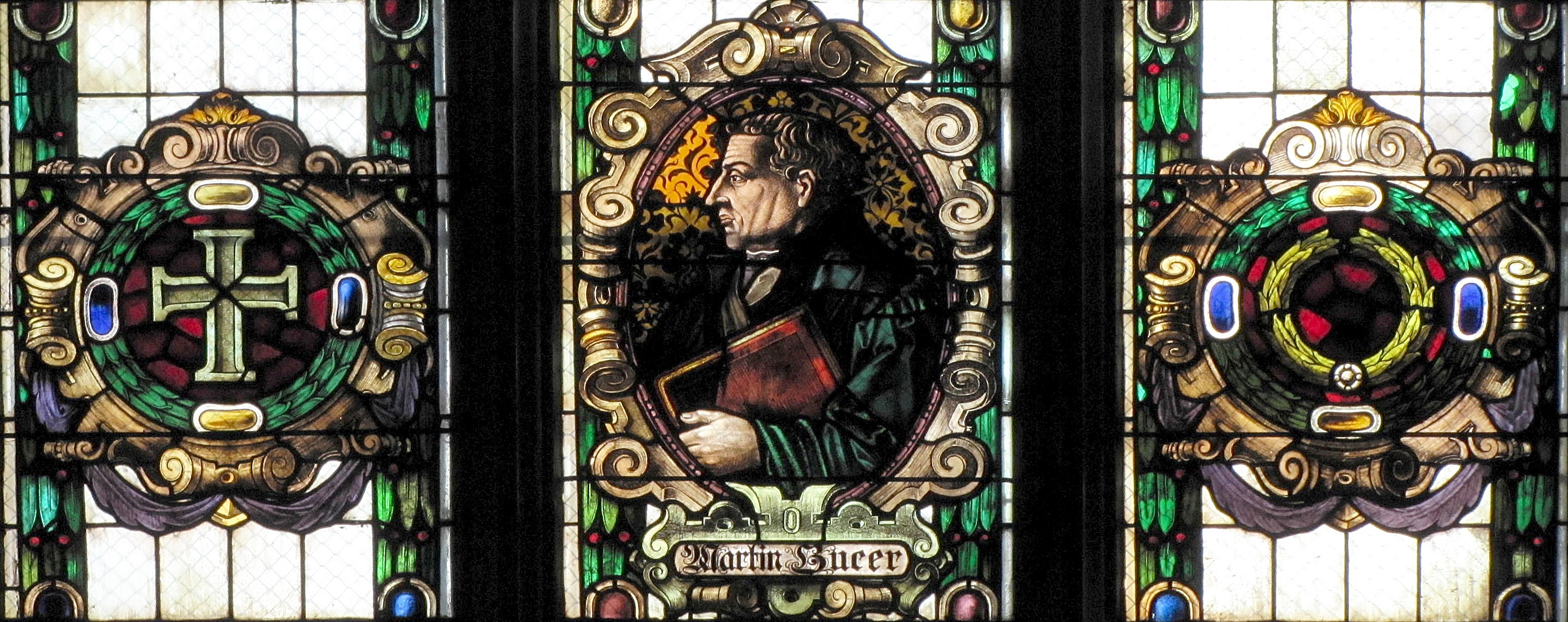 Alsace, Bas-Rhin, Église protestante Saint-Sauveur de Strasbourg-Cronenbourg, rue Jacob. Vitrail représentant Martin Bucer (XXe)